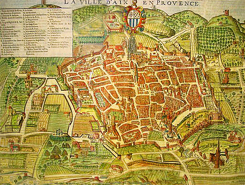 Carte en couleurs d'Aix-en-Provence